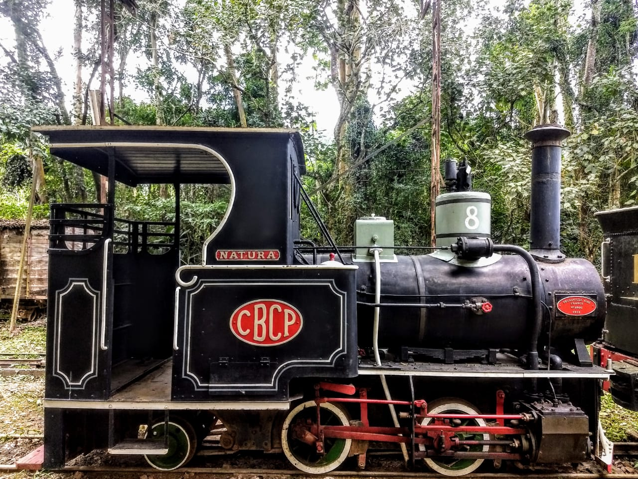 Locomotiva utilizada na Companhia Brasileira de Cimento Portland Perus, para tracionar trens nas minas de extração de matéria prima.